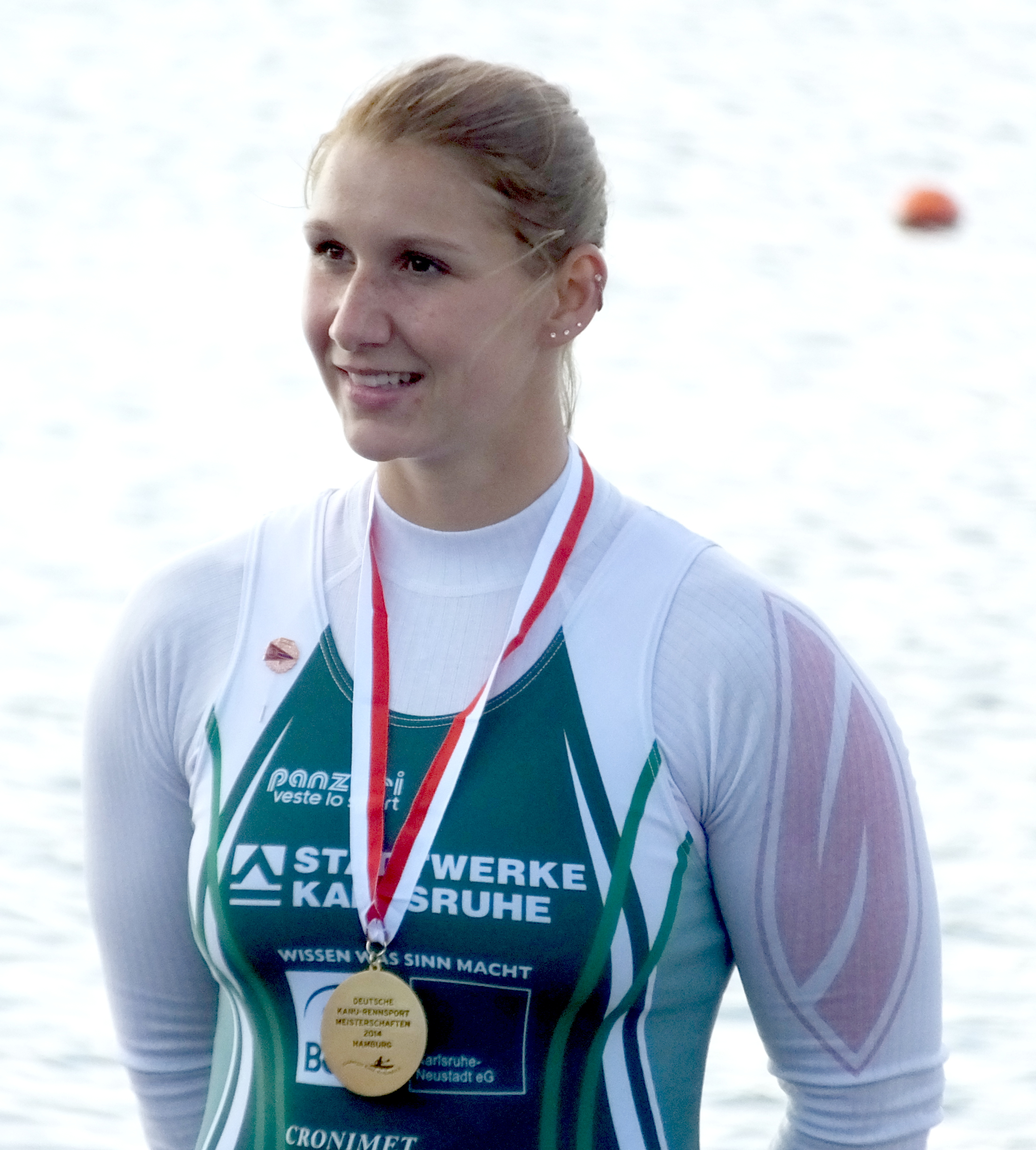 Sabrina Hering, Deutsche Kanutin